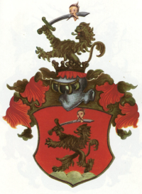 Az alapi Salamon család bárói ágának címere